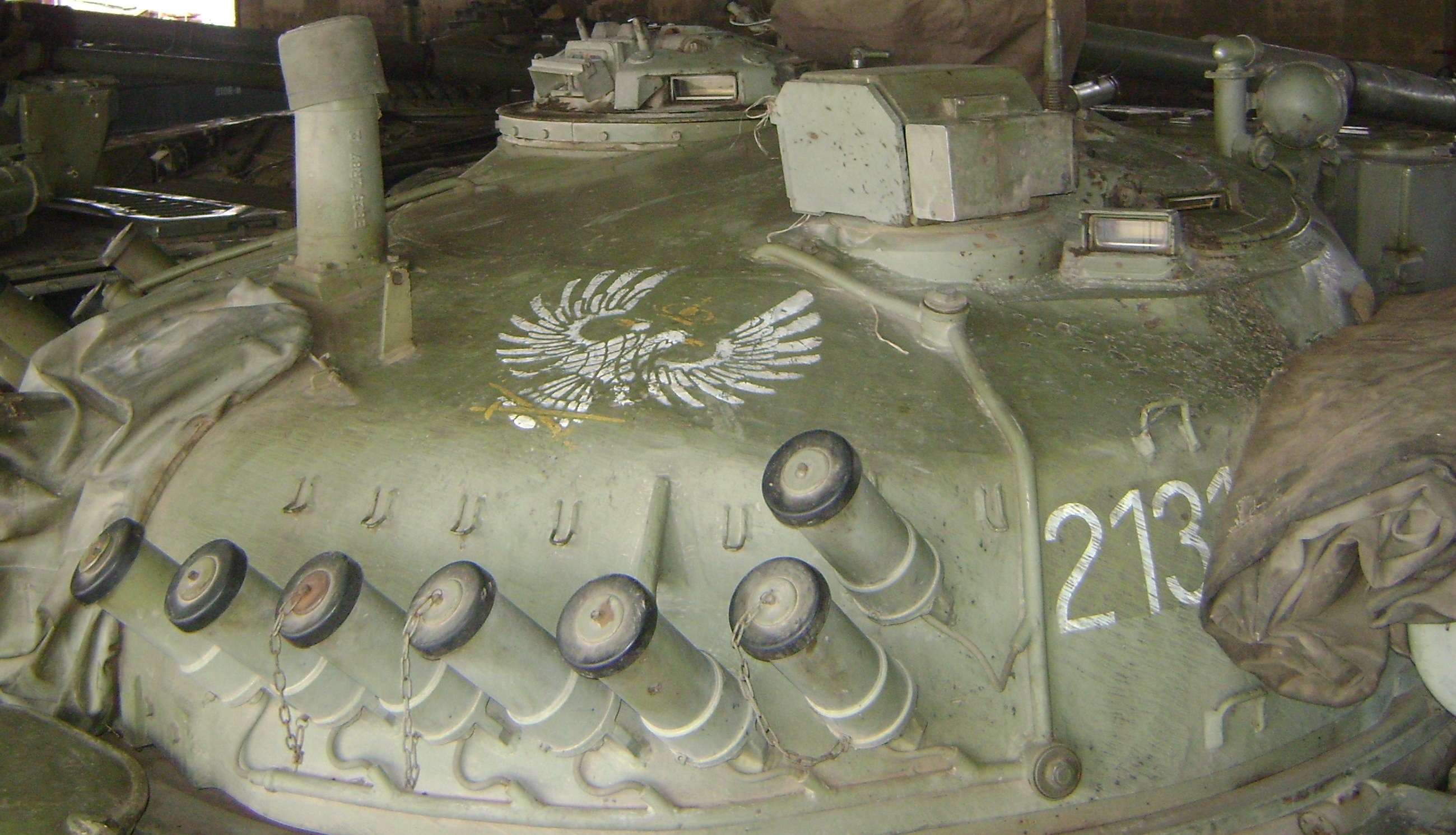 Wappen der VRS am Turm eines M84-Kampfpanzers